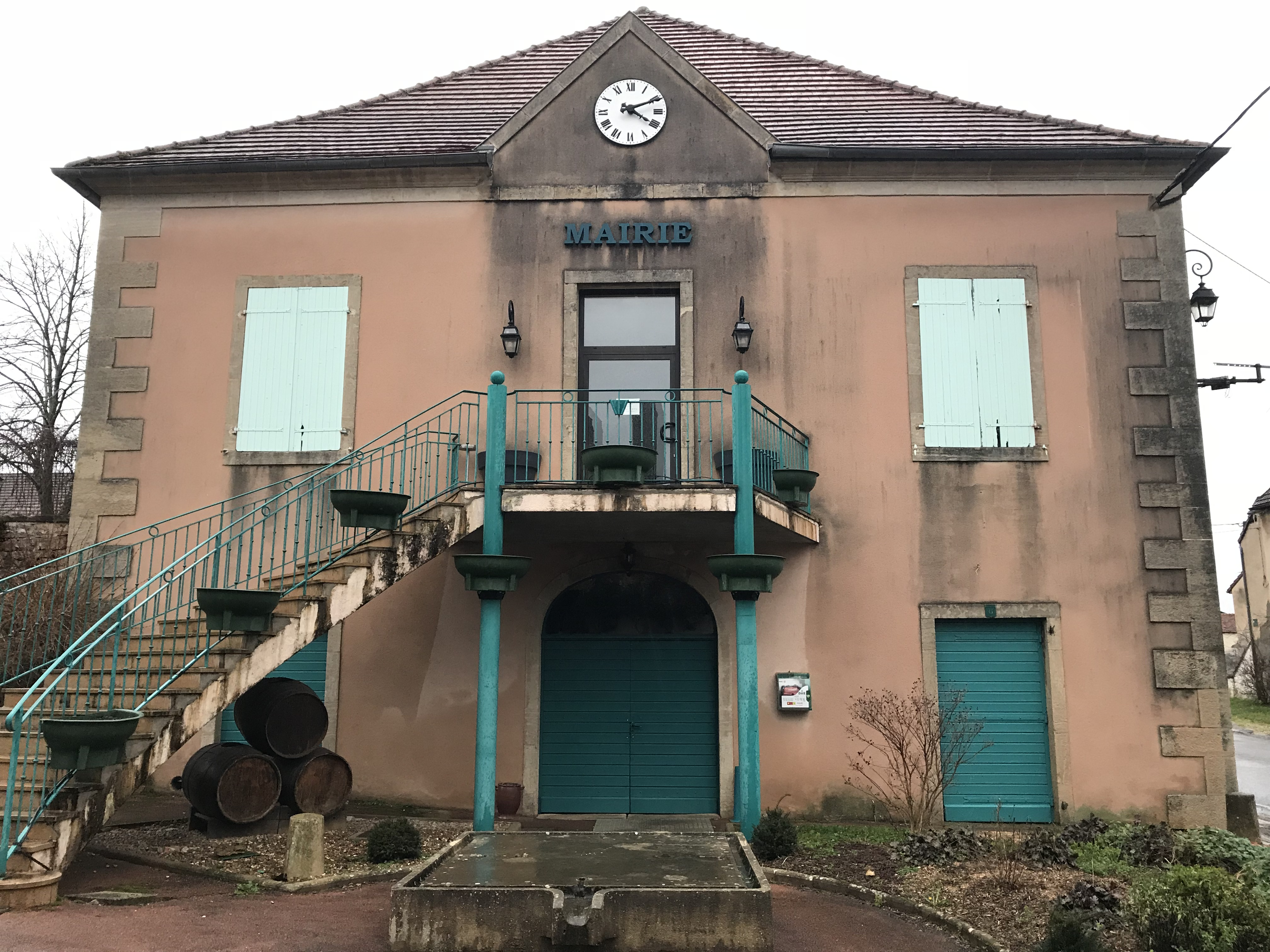 Rainans (Jura) en janvier 2018.